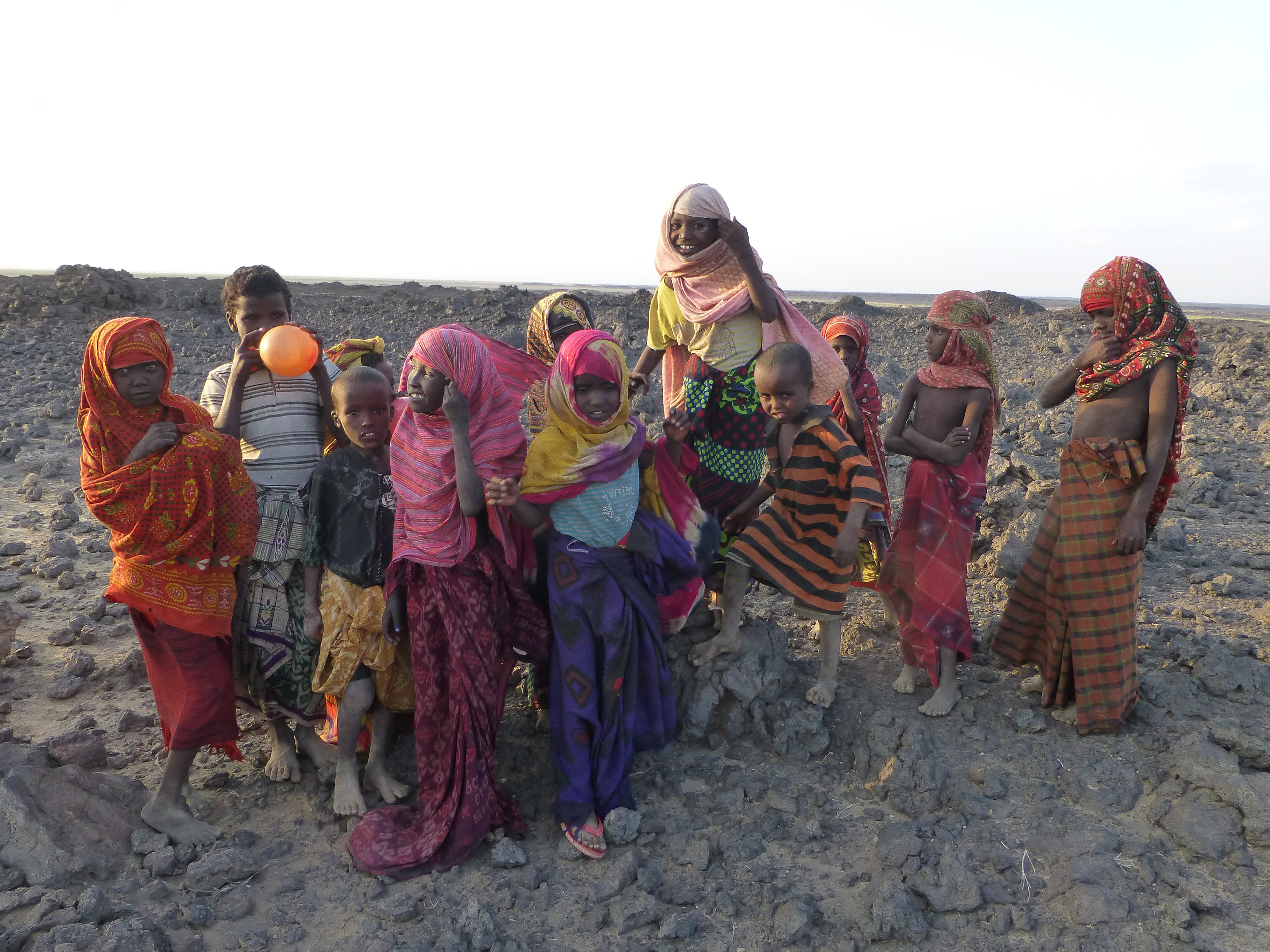 Ethiopie, région de l'Erta Ale : enfants Afar